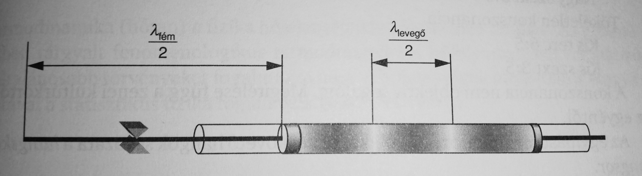 A Kundt cso szerkezet